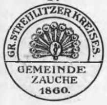 Altes Siegel bzw. Stempel der Gemeinde Zauche im Kreis Groß Strehlitz.